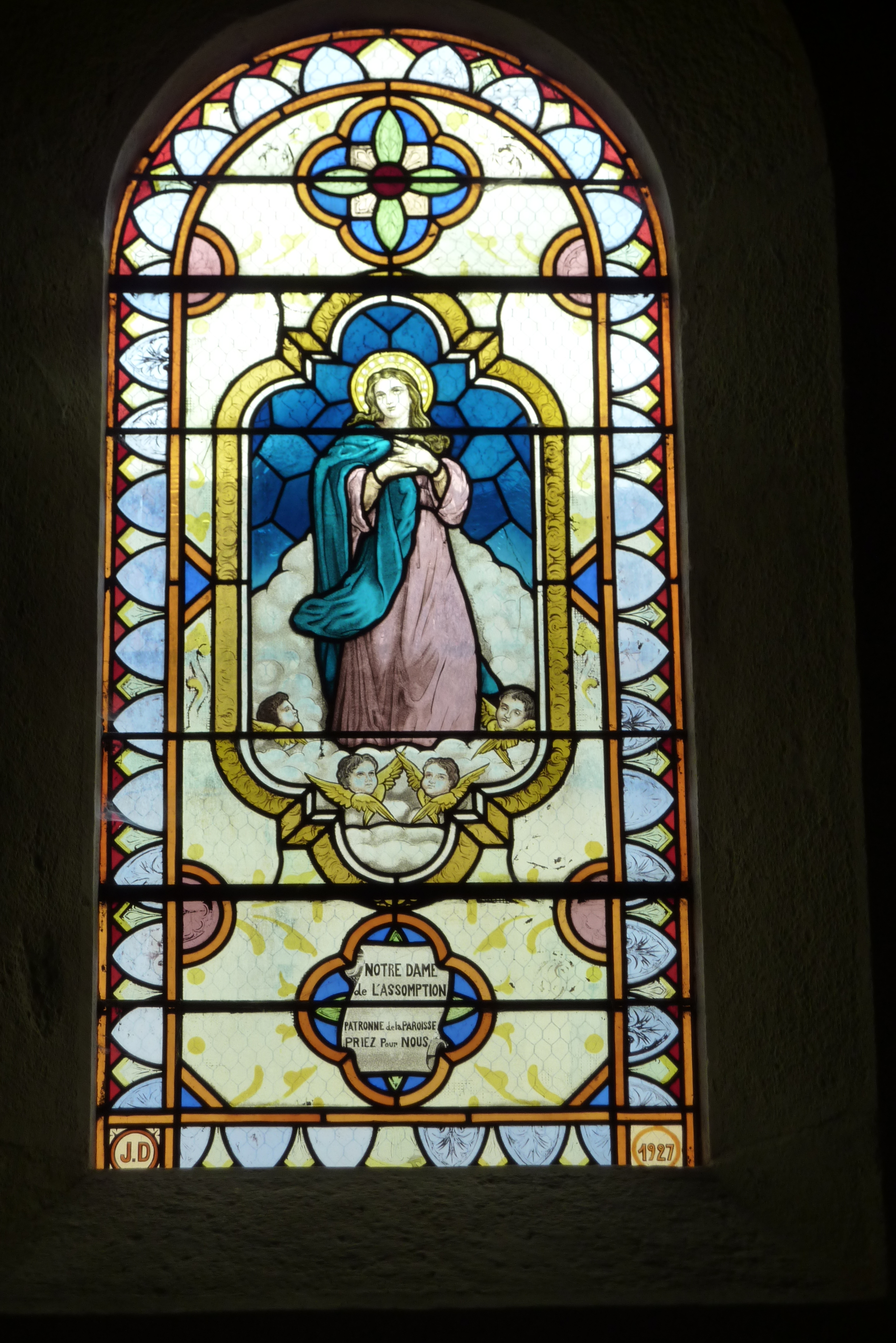 Bleiglasfenster in der Kirche von Palinges, Darstellung: Maria Himmelfahrt; J.D 1927